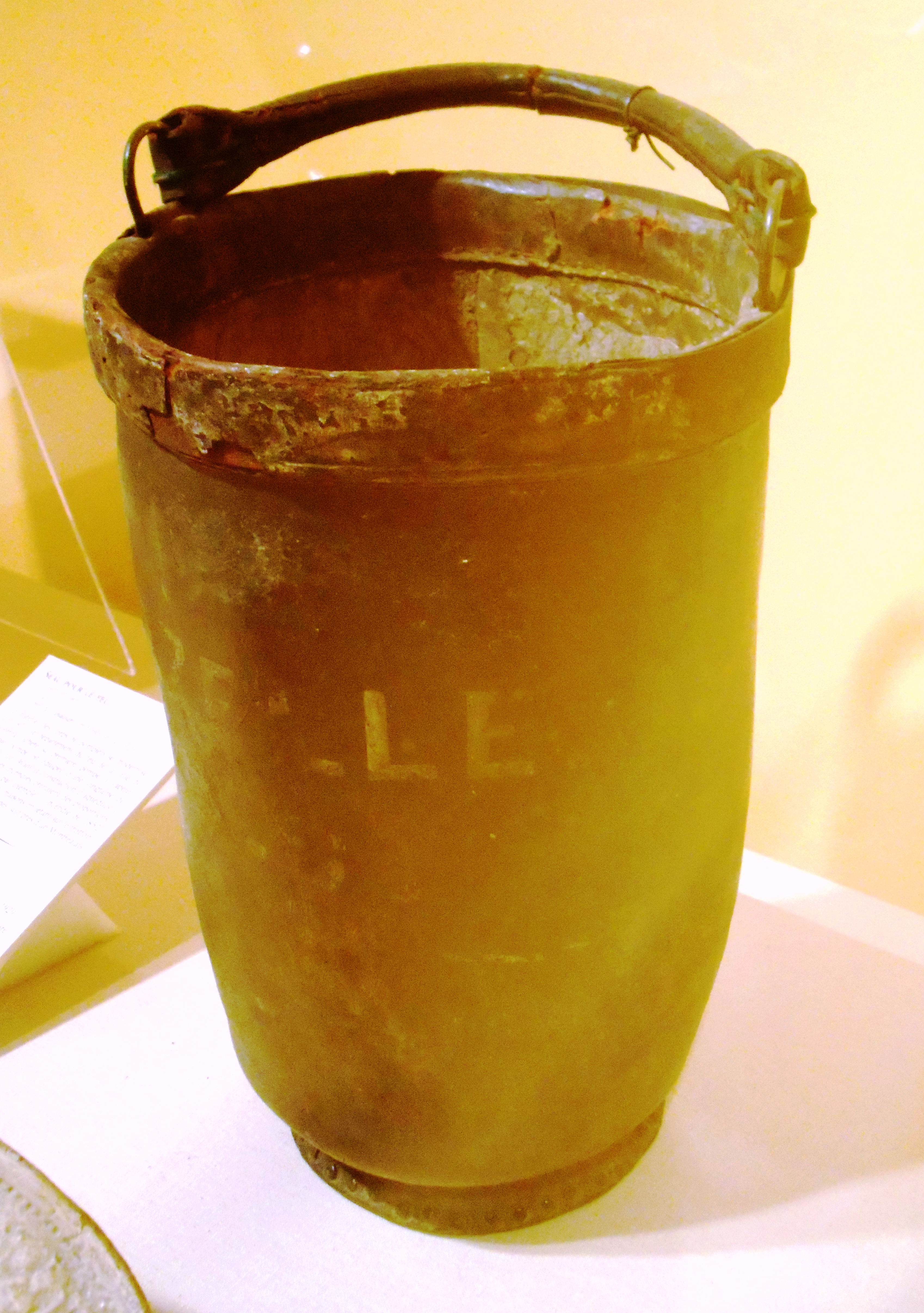 Seau pour le feu, fin XIXe siècle, cuir, donation du Canadian Fire Hose Co. Ltd., 1929